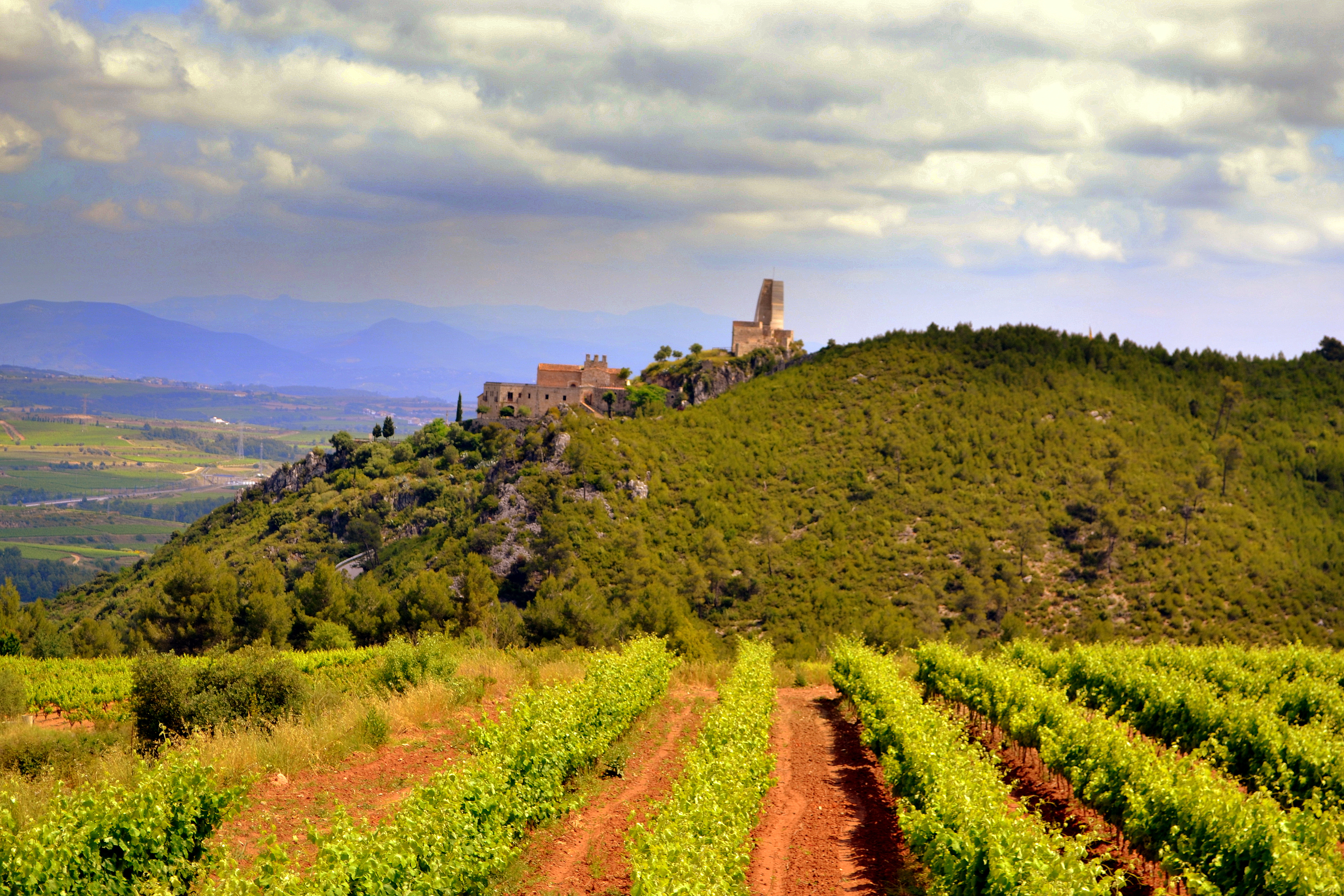 Castell de Subirats, el Penedes, Barcelona